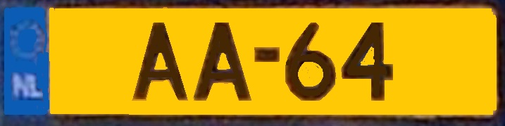 Koninklijke kentekenplaat AA-64